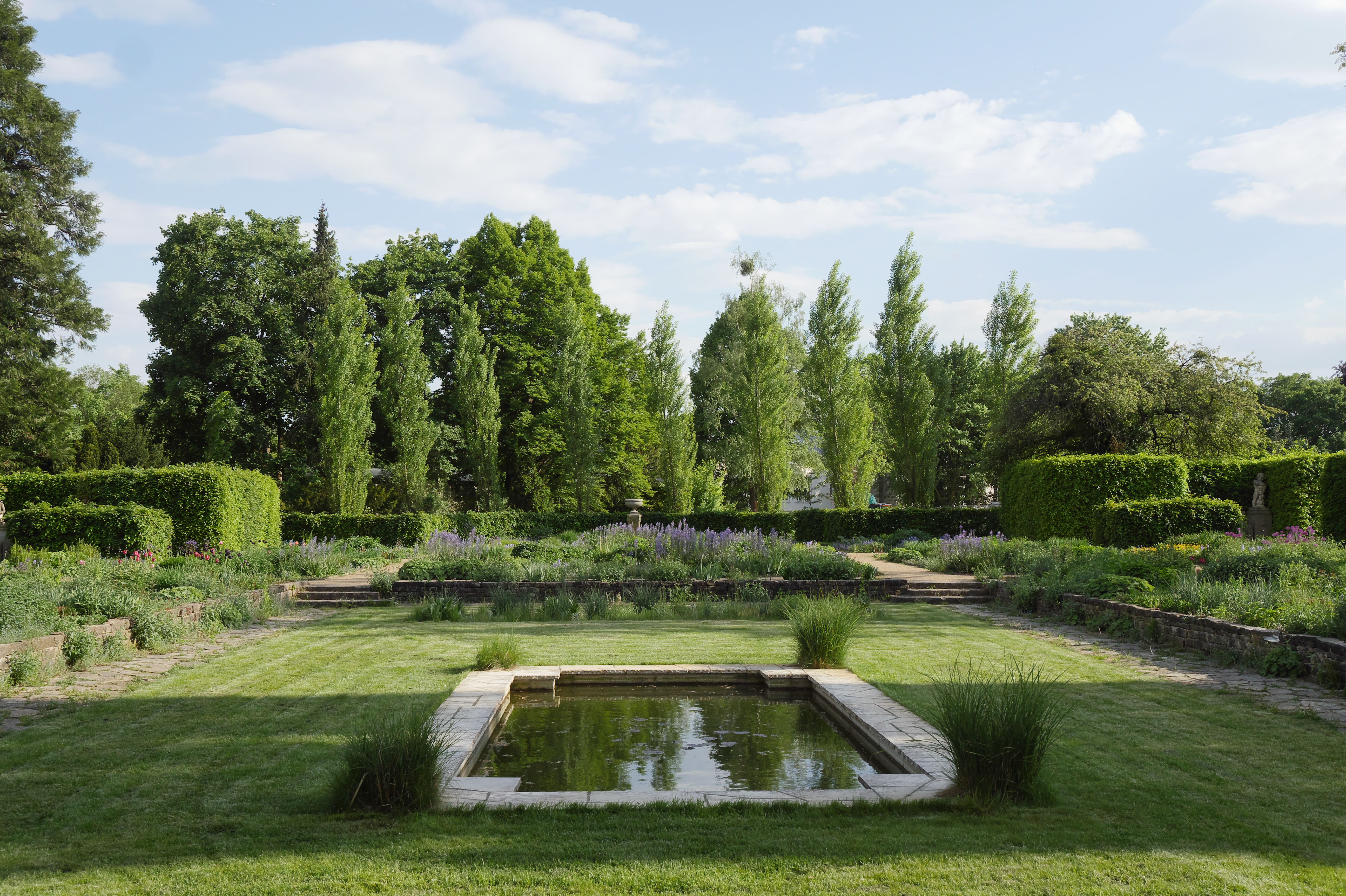 Institut für Lebensmitteltechnologie und Lebensmittelchemie TU Berlin (Dahlem), Königin-Luise-Straße 22, Staudengarten in den wiederhergestellten Schaugärten